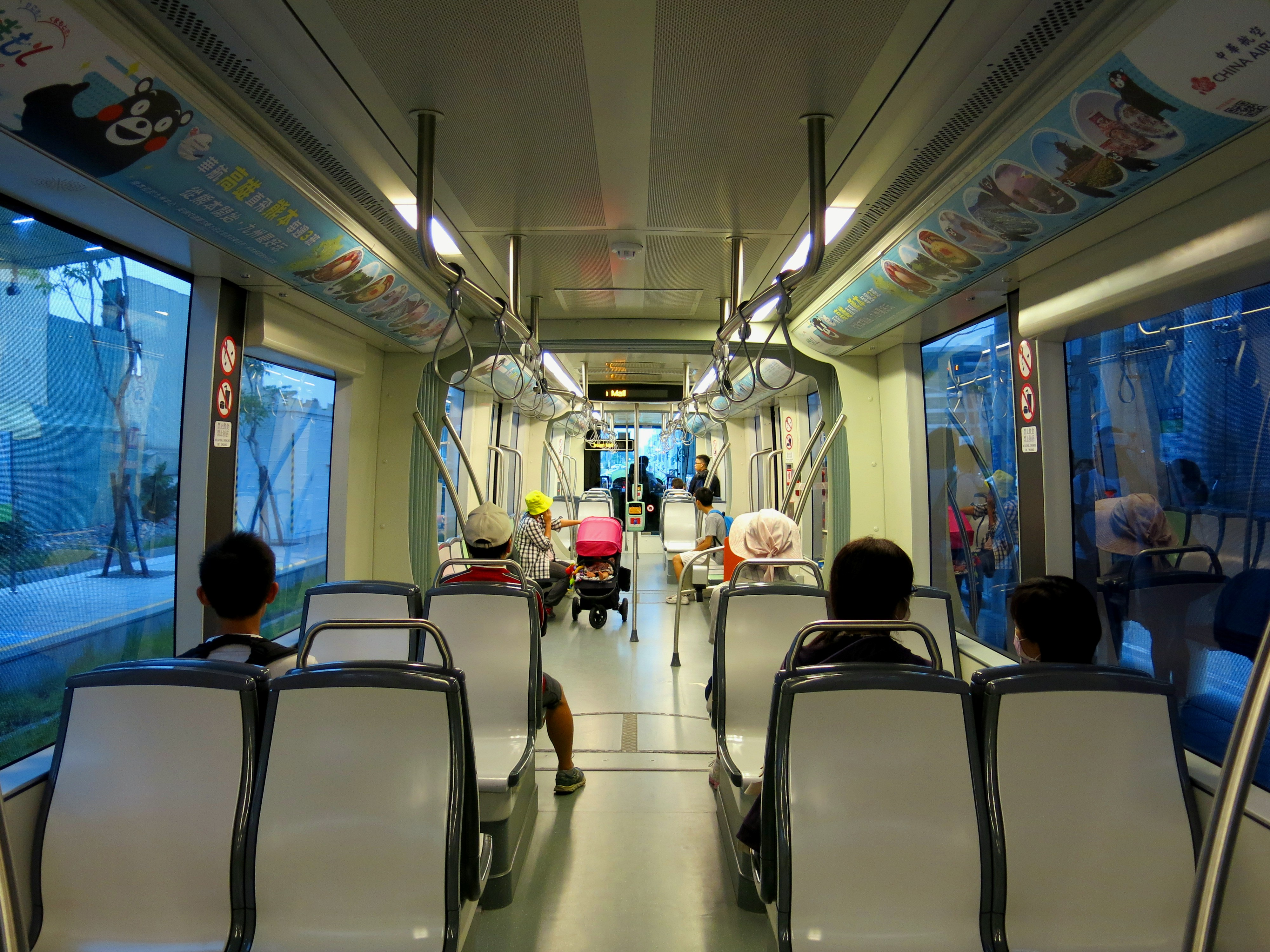 中文（台灣）: 高雄輕軌電聯車內裝